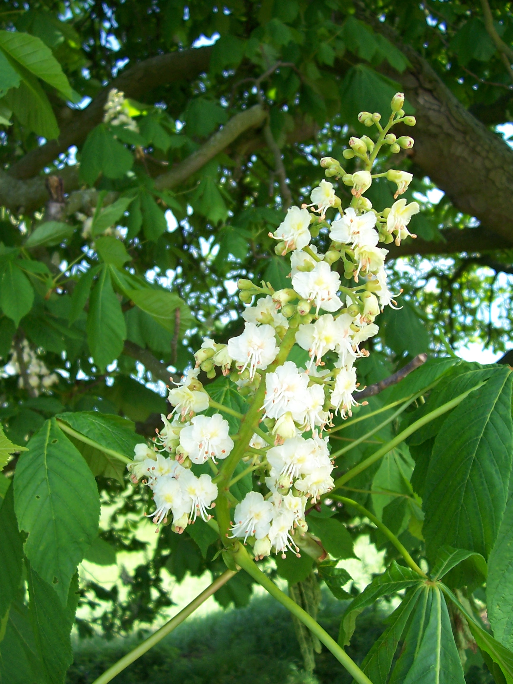 Rosskastanienblüte bei Fronhausen, Landkreis Marburg-Biedenkopf, Hessen, Deutschland